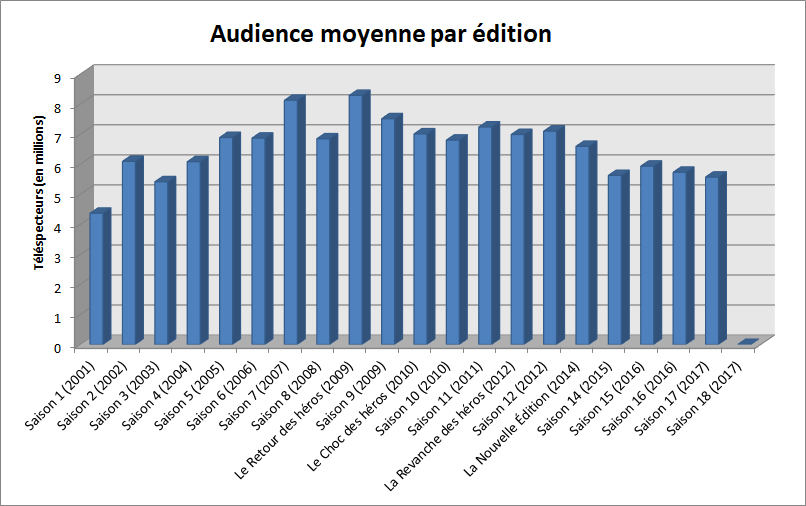 Audiences de Koh-Lanta par saison